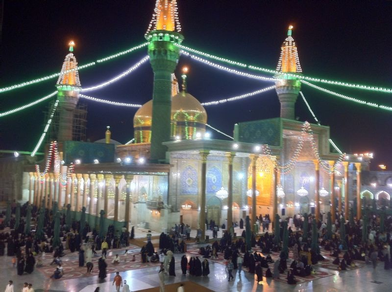 ضريح الإمام الكاظم في الكاظمية في بغداد العراق